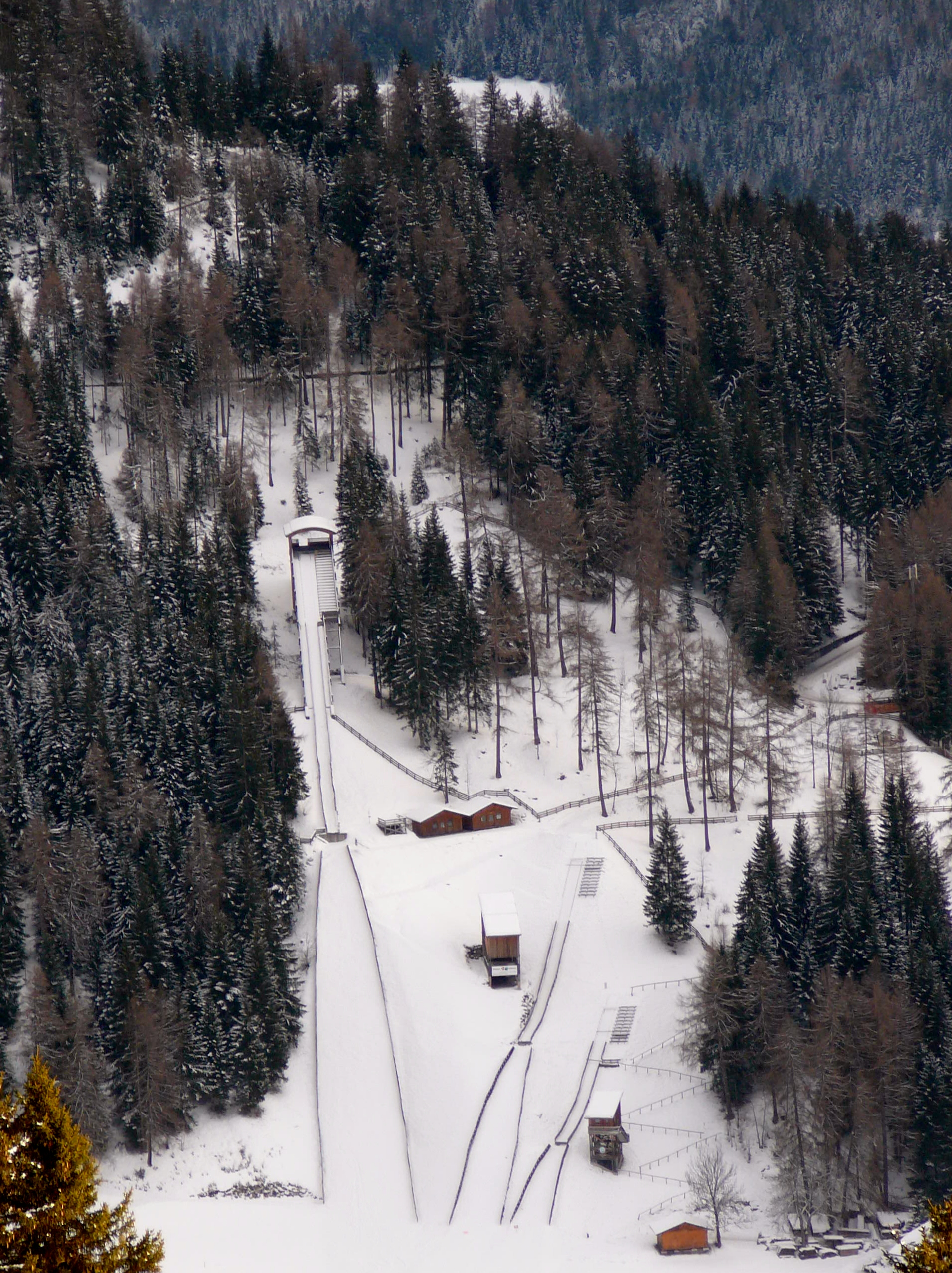 Tramponi da sci a Dobbiaco